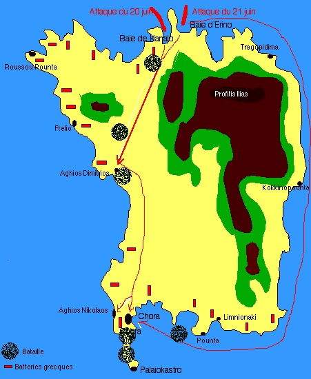 Carte de l'attaque de Psara par les troupes ottomanes. Map of the ottoman attack on Psara island. 20 et 21 juin 1824 (calendrier julien) 2 et 3 juillet 1824 (calendrier grégorien).